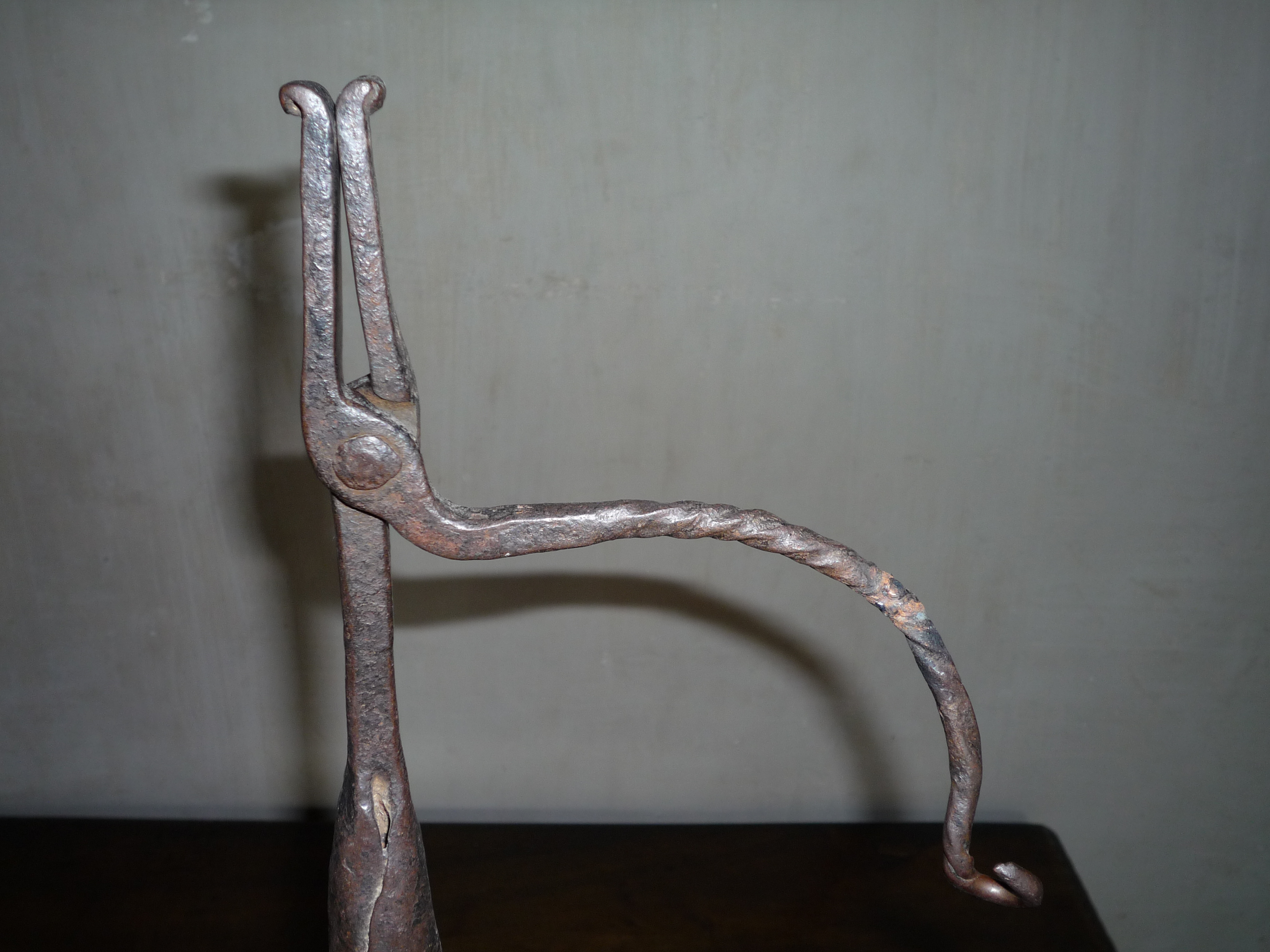 Kienspanhalter in der Burg Meersburg am Bodensee